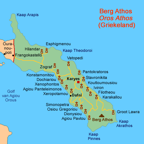 Kaart van Berg Athos